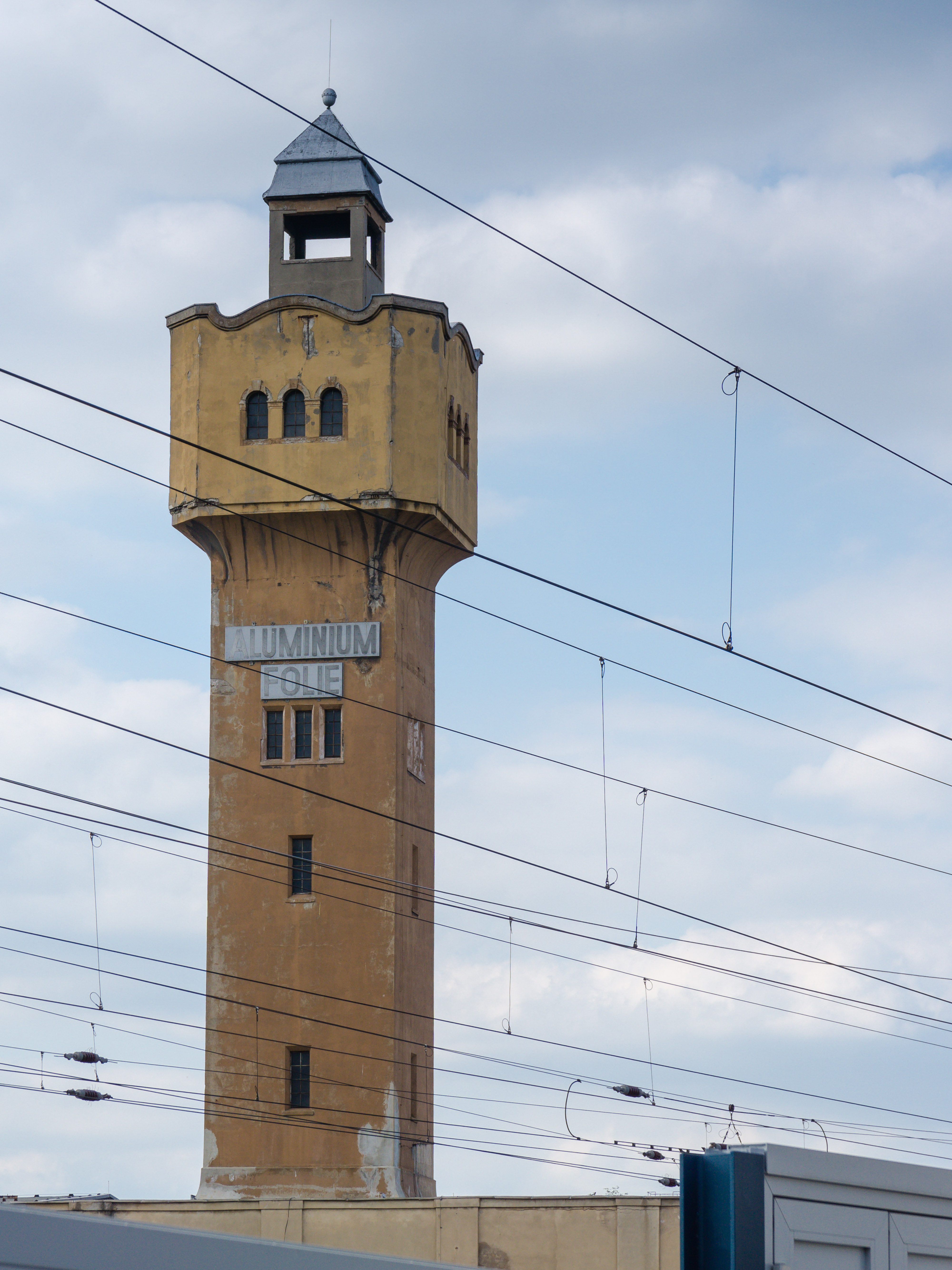 Wasserturm Aluminium-Folie, August-Bebel-Straße 1 in Merseburg